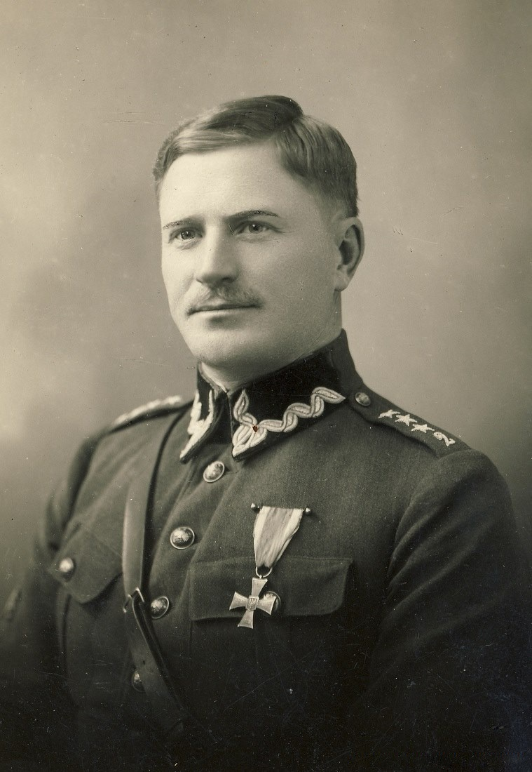 Kpt. Władysław Kuncewicz, Puławy 1928r.